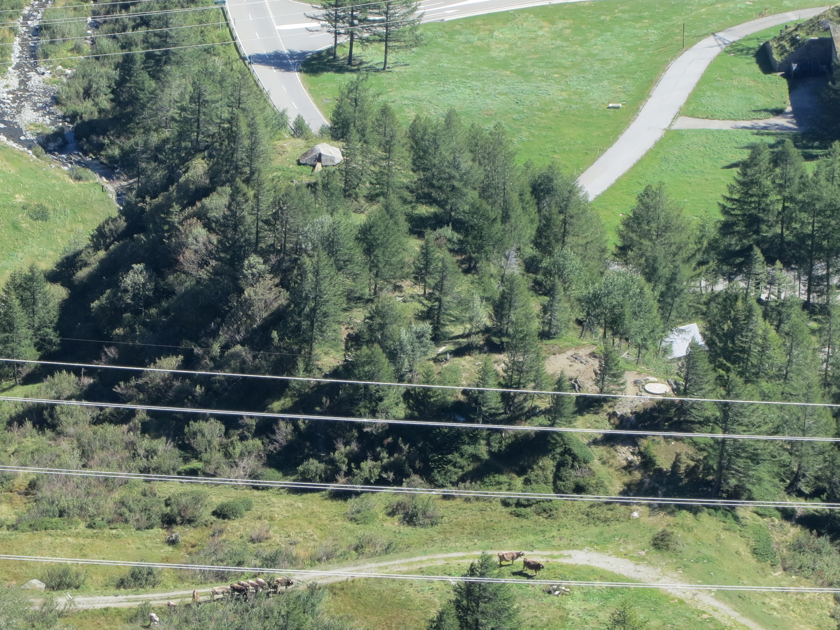 Artilleriewerk Foppa Grande, Airolo, Schweiz